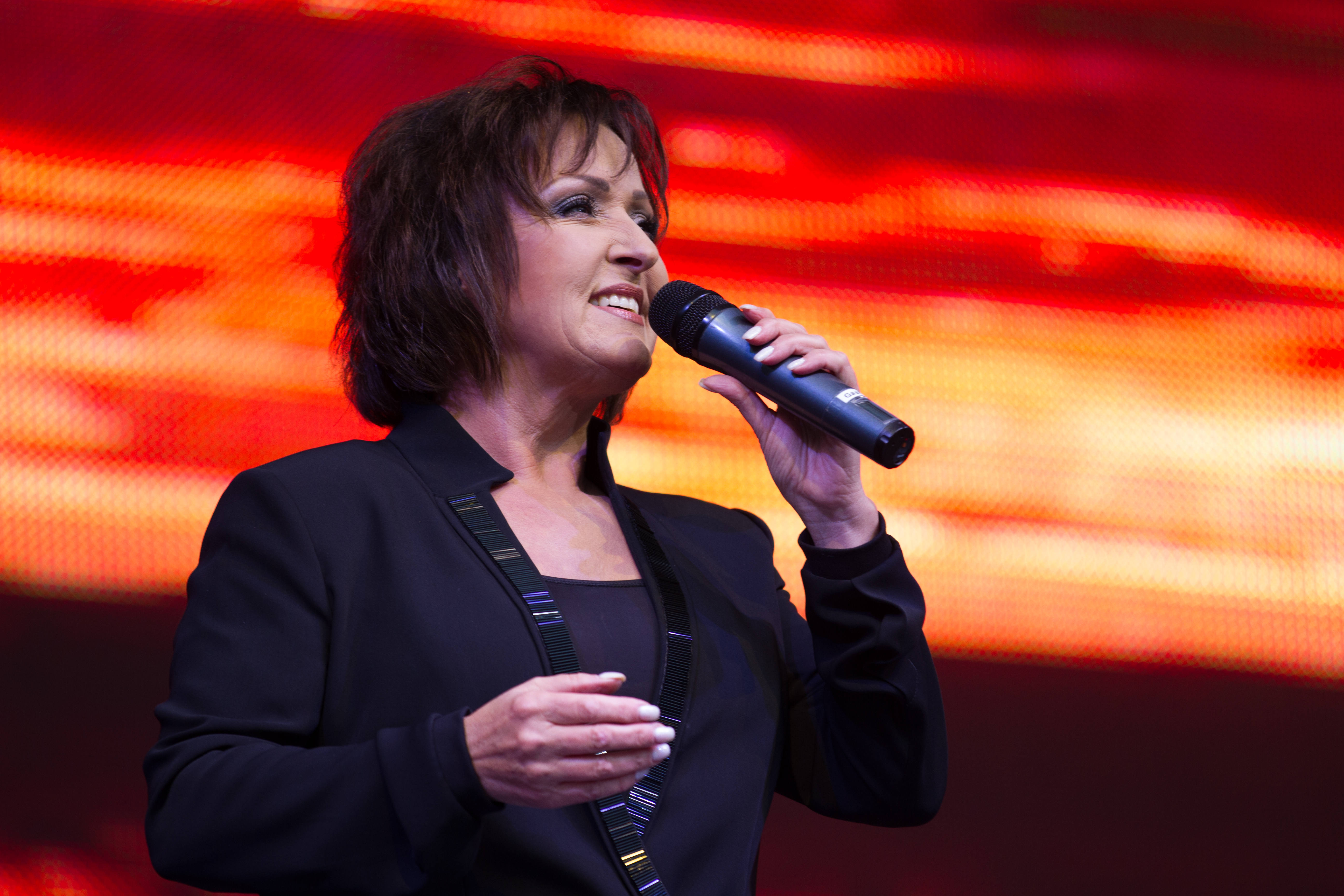 Ute Freudenberg zu Gast beim "Karat 40 Jahre KARAT - Das EINZIGE Jubiläumskonzert" in der Berliner Waldbühne am 20.06.2015